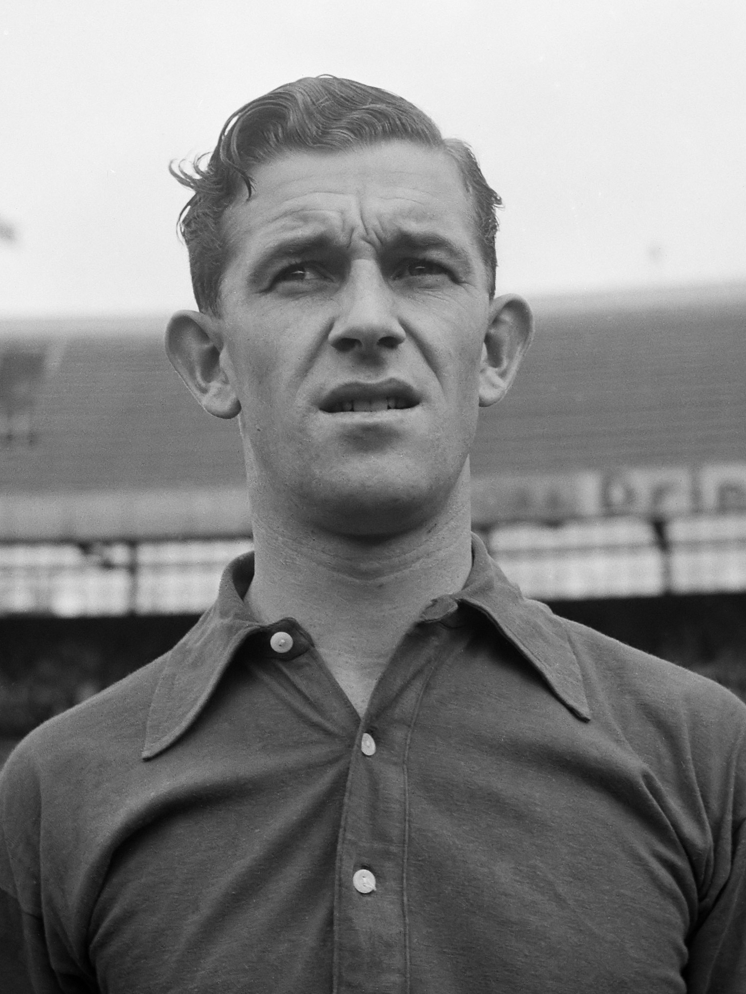 Nederlands elftal, Brooymans ( Willem II ) 6 oktober 1955